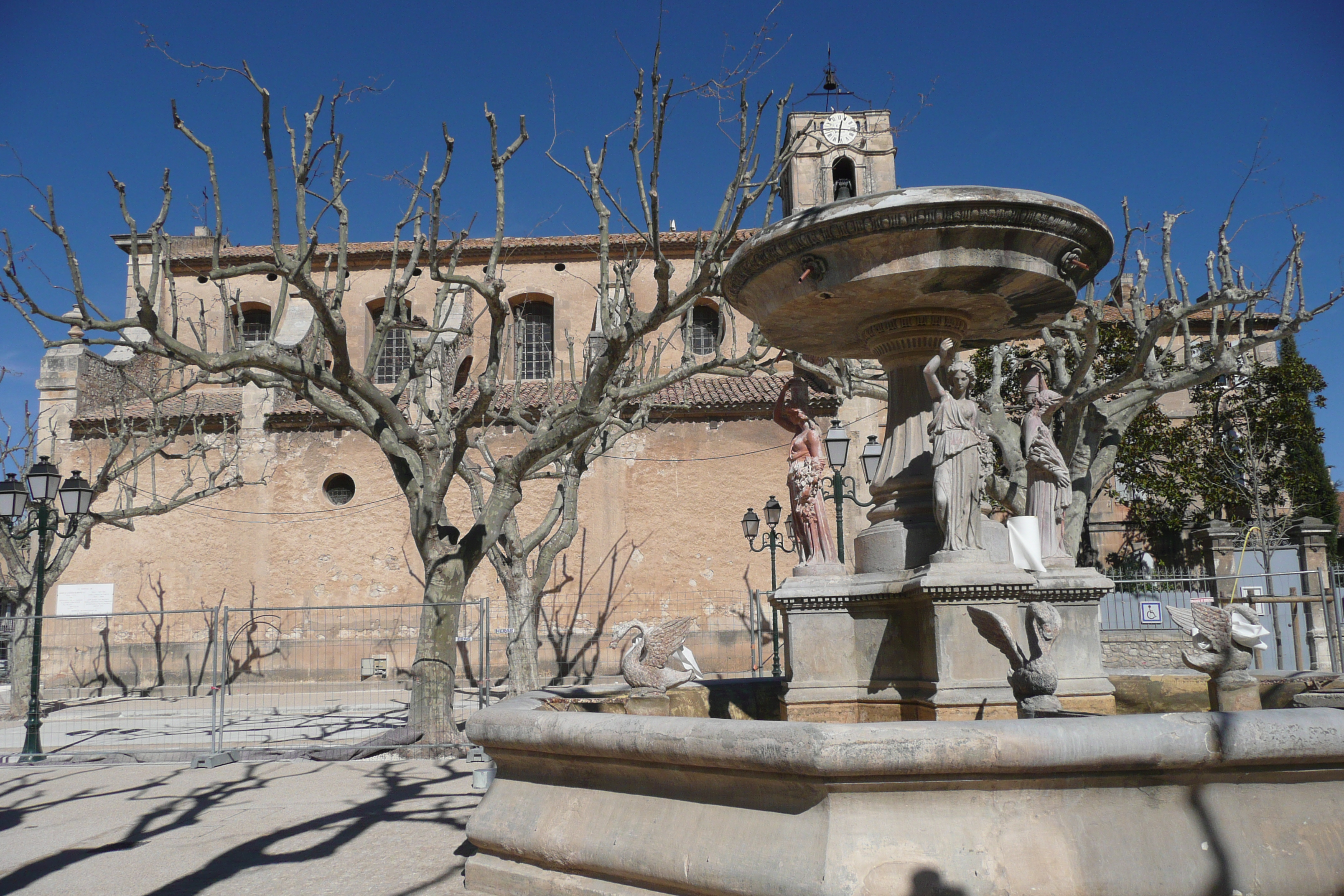 43°43′15.8″N 4°48′19.3″E / 43.721056°N 4.805361°E